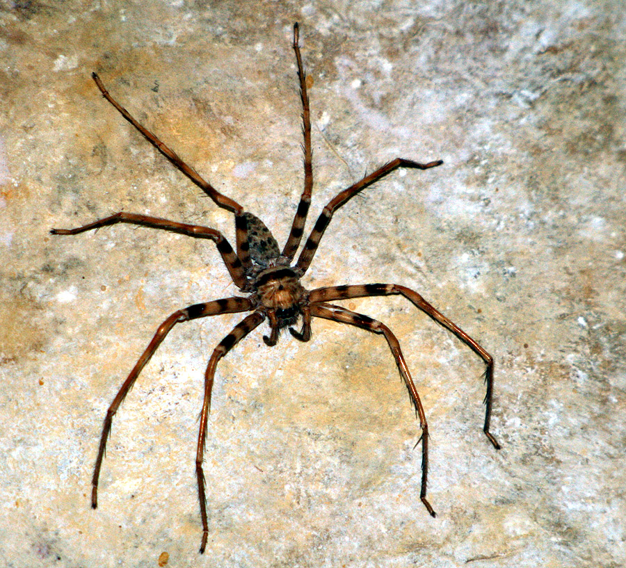 Binomial name: Heteropoda maxima de: Laotische Riesenkrabbenspinne en: ? fr: ?